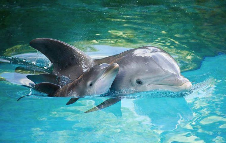 dalfines subidos por la biblioteca